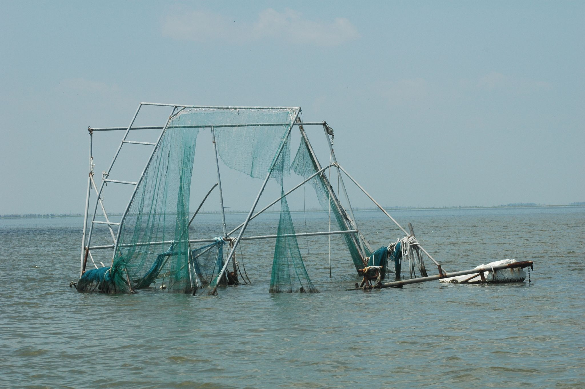 Hurrican debris on Lake Calcasieu, 2006